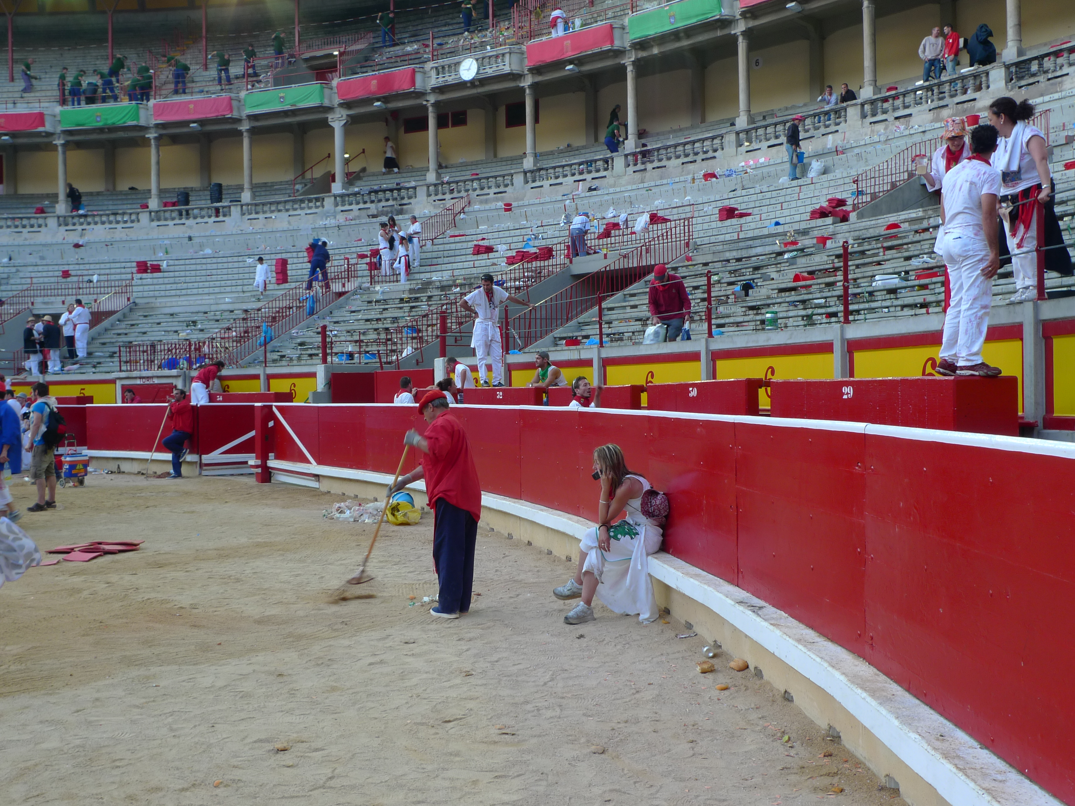 sanfermin 2009, pamplona, spain